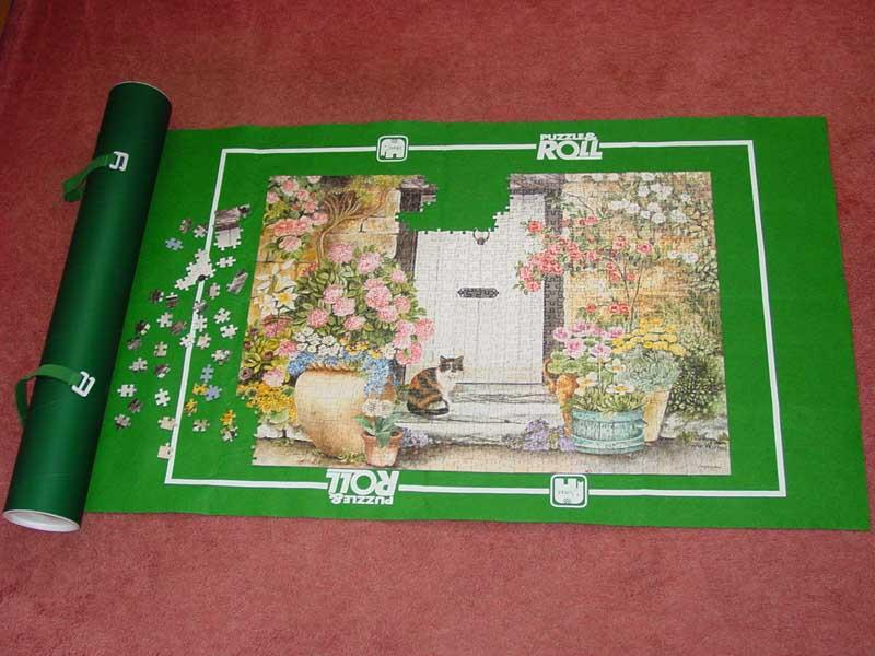 Jigroll